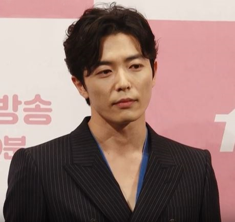 tvN 수목드라마 '그녀의 사생활' 제작발표회가 10일 오후 서울시 강남구 논현동 임패리얼 팰리스서울에서 열렸다.